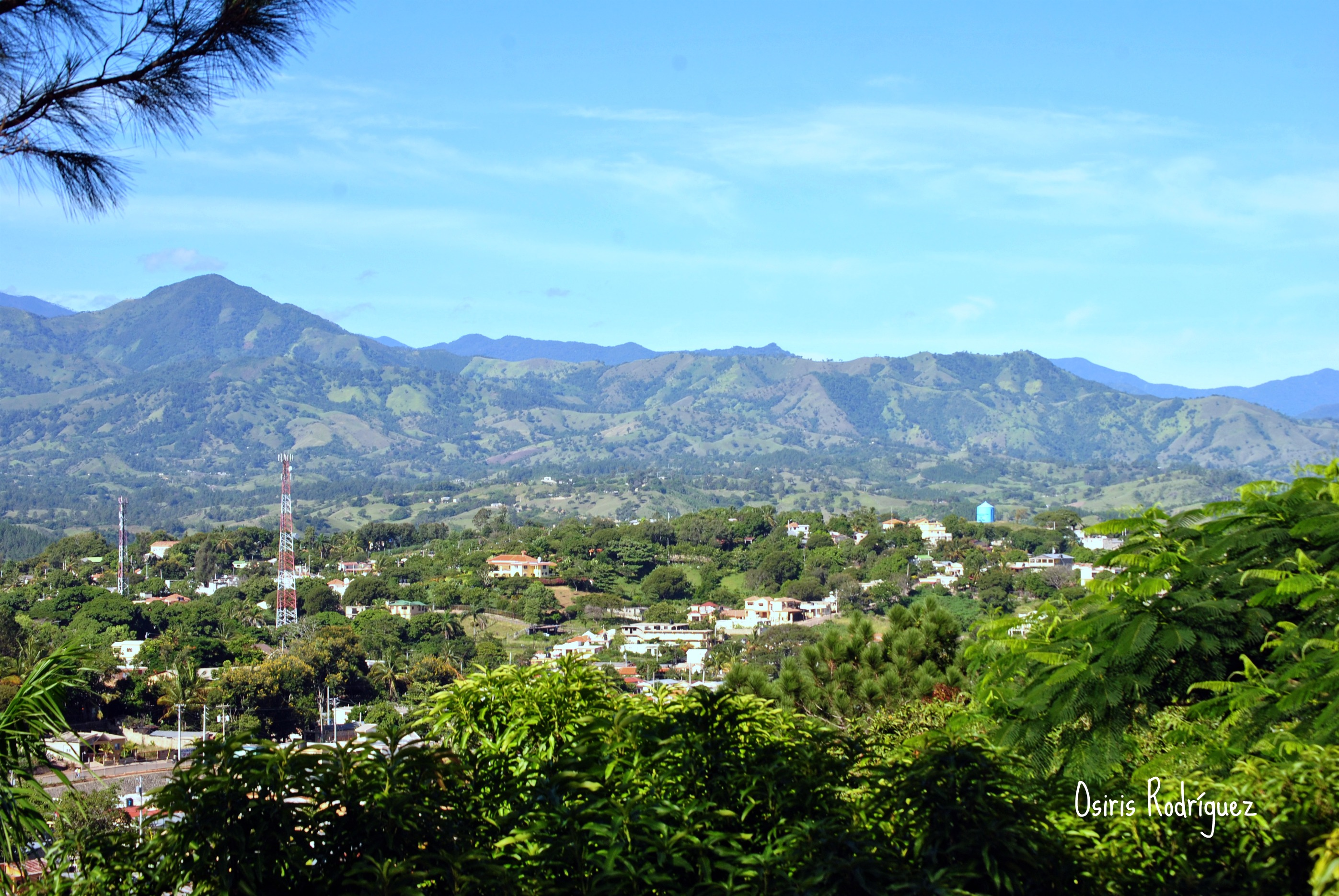 Municipio de San Jose de las matas